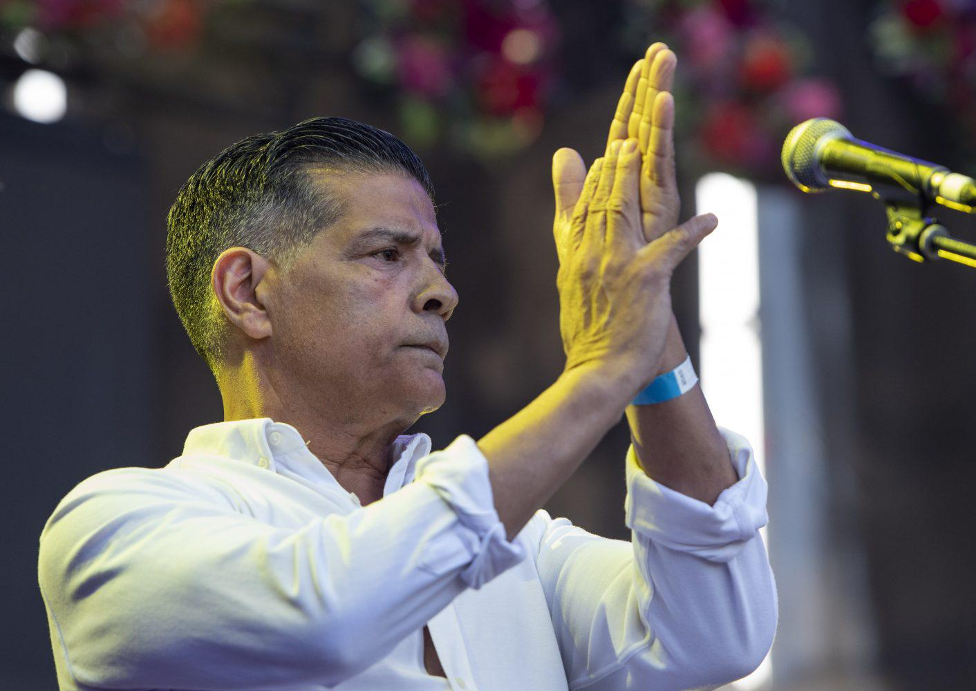 Los sonidos más rumberos se apoderaron ayer de la noche madrileña. Miles de personas abarrotaron los escenarios, a un lado y a otro del río.